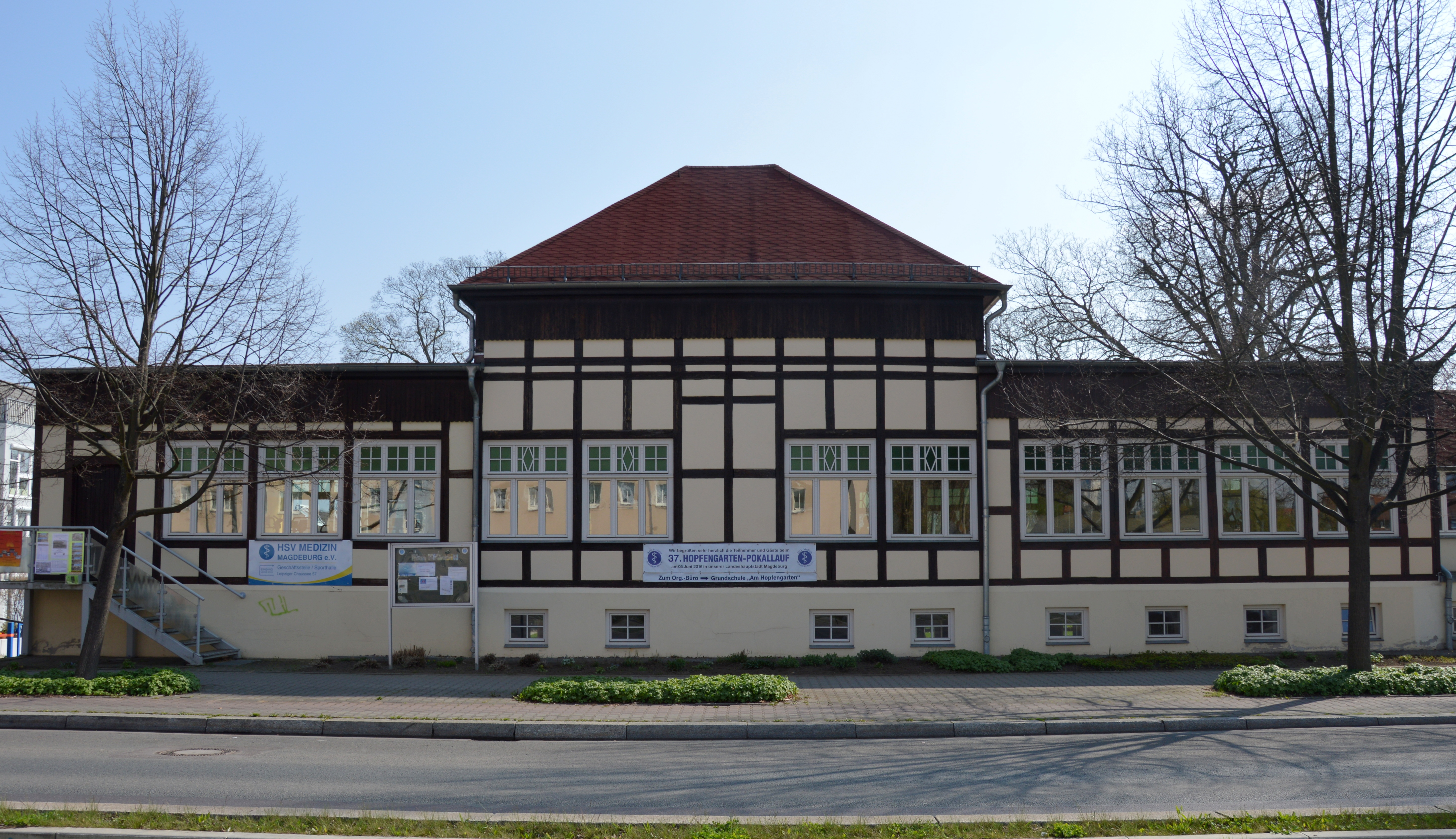 Haus Leipziger Chaussee 57 in Magdeburg